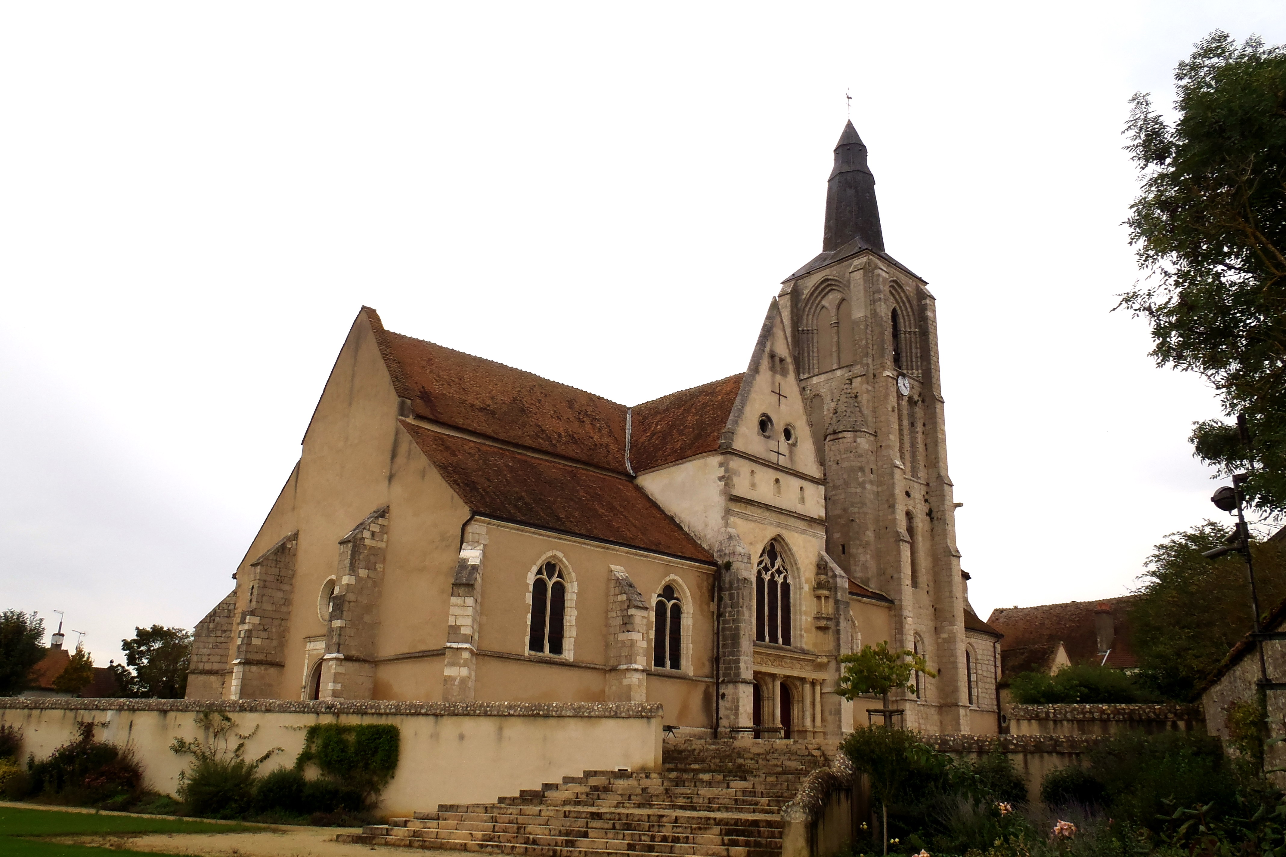 Église Saint-Aignan de Bonny-sur-Loire